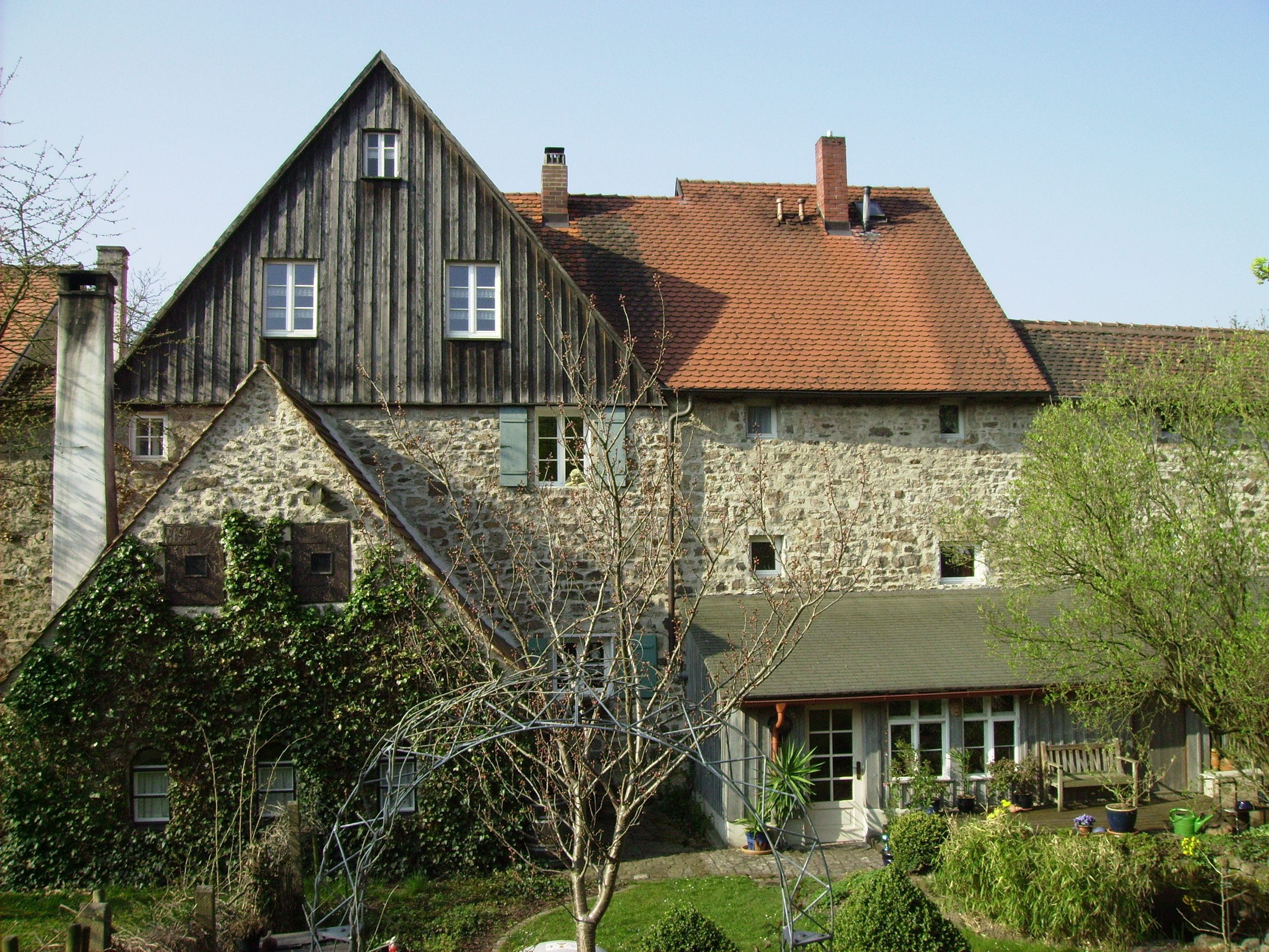 Stadtmauer Feuchtwangen im Nordosten